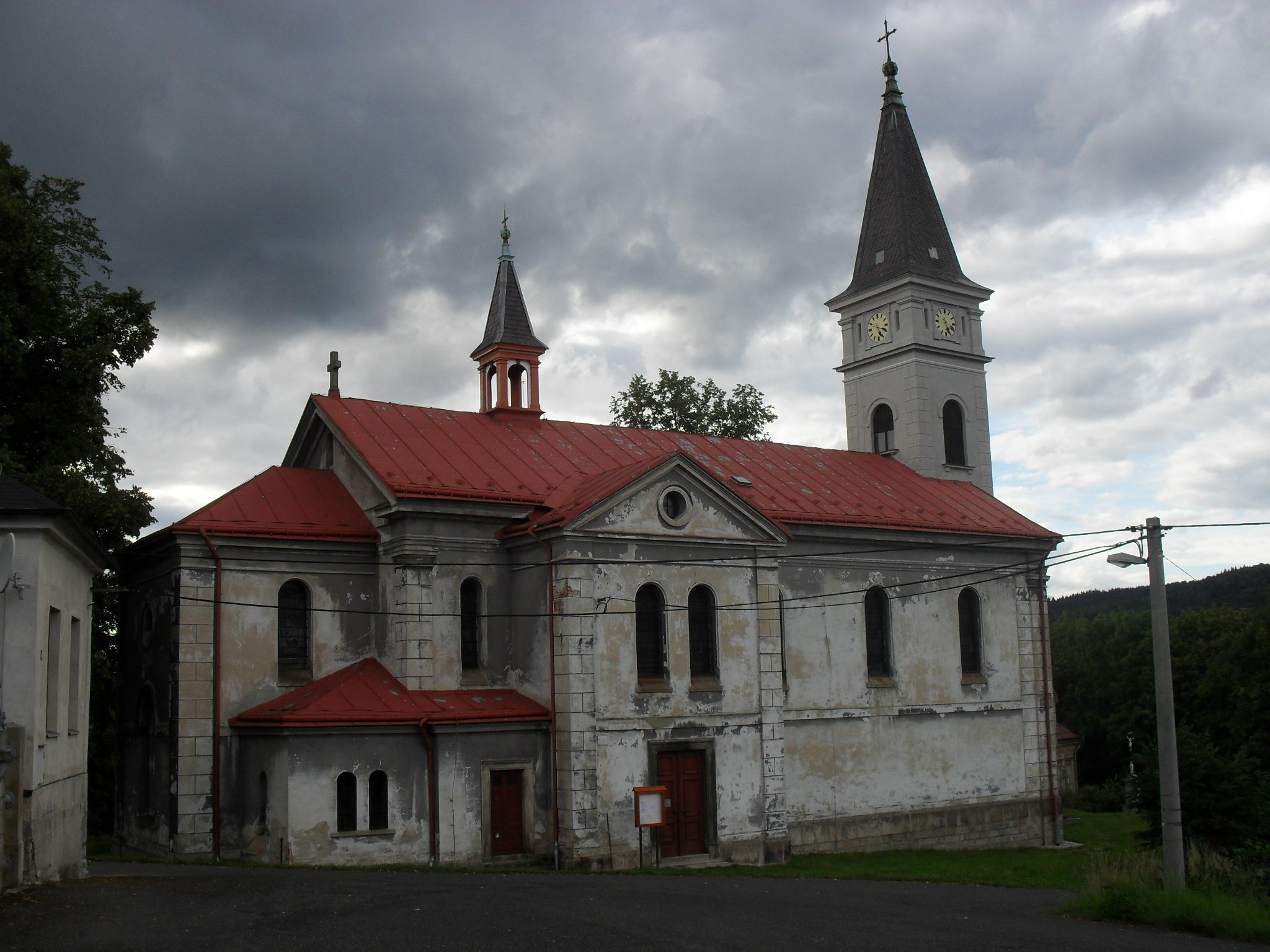 Kostel Navštívení Panny Marie v Lučanech nad Nisou